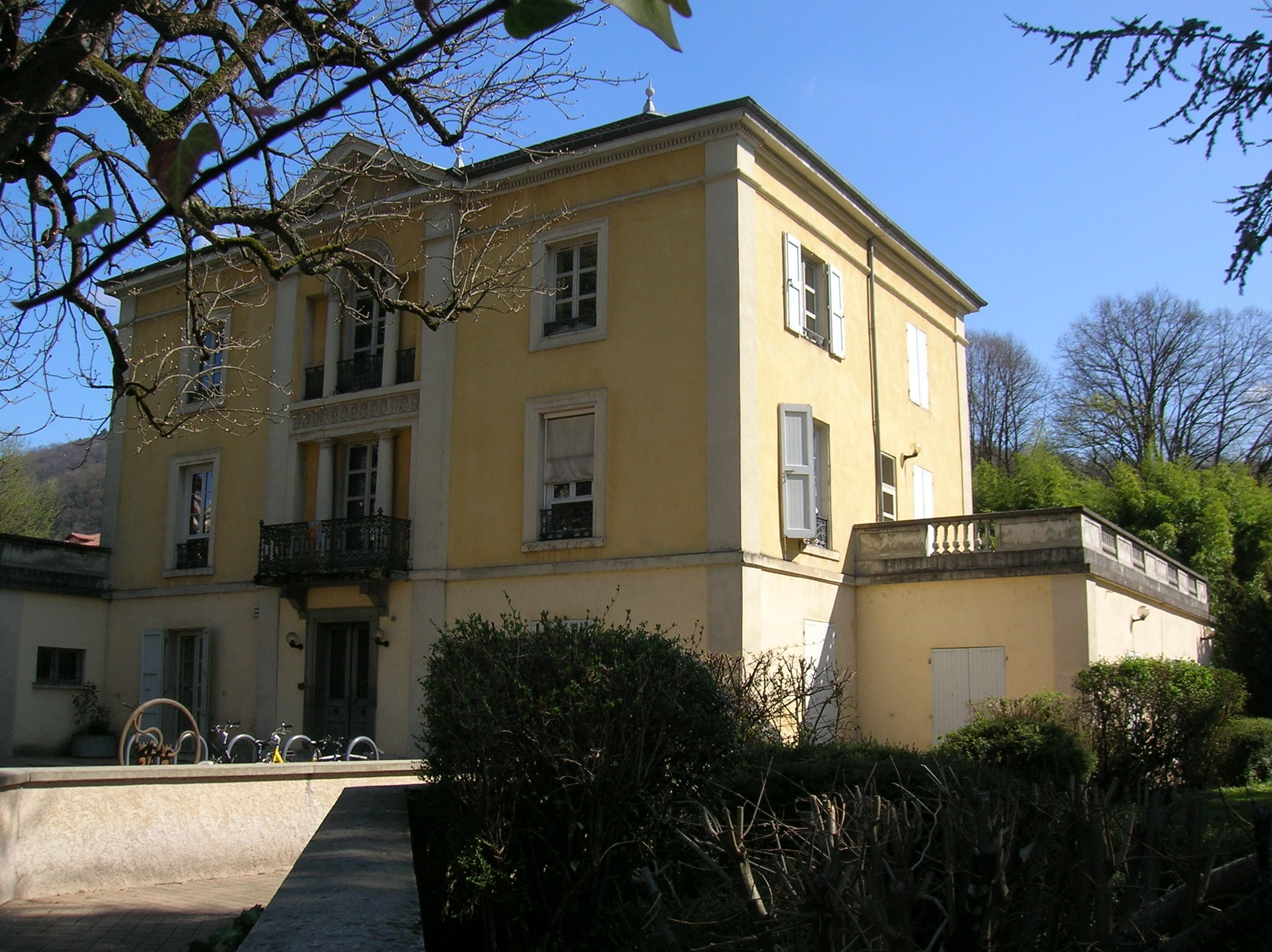 maison d' Henry Duhamel. Clos d’Espiés, Gières, Isère, AuRA, France.